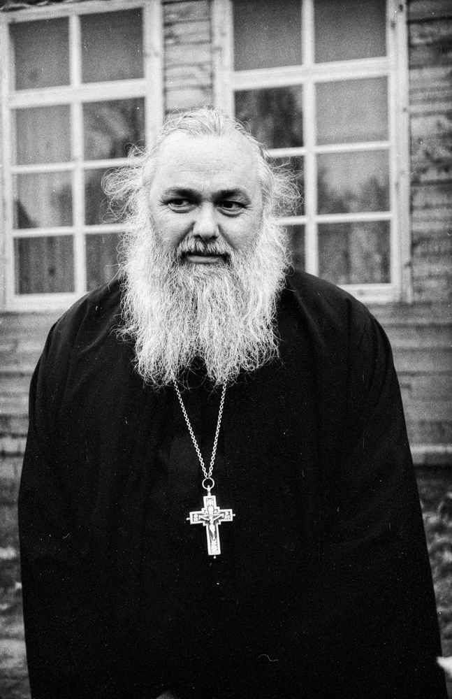 Иеромонах Пётр Василенко — настоятель Алексиевой пустыни в селе Новоалексеевка, Переславский район.